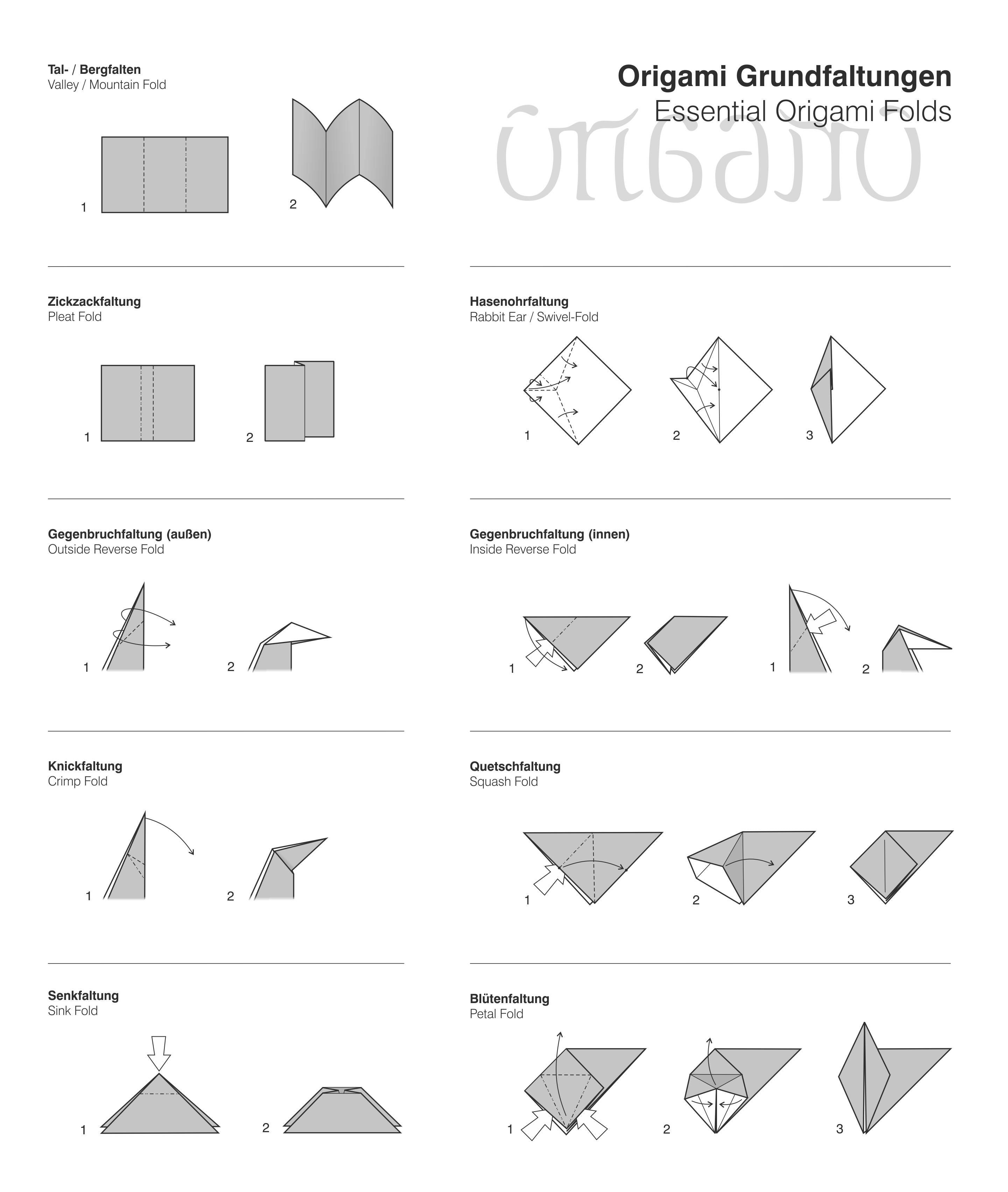 1Origami Grundfaltungen